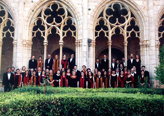 Fotografia de grup de la Coral Cantiga a Santes Creus (Catalunya), l'any 2000